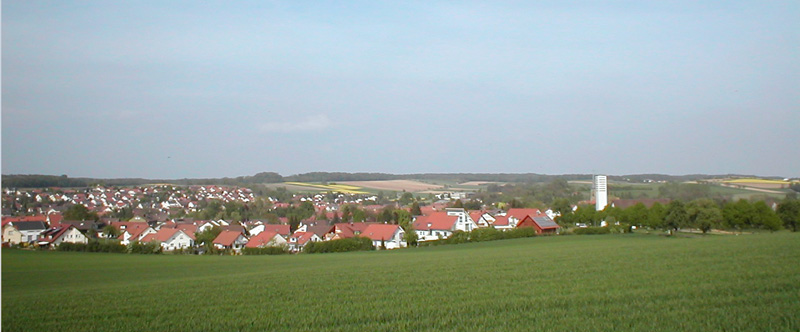 Blick über Gemmingen (Landkreis Heilbronn, Baden-Württemberg, Deutschland)